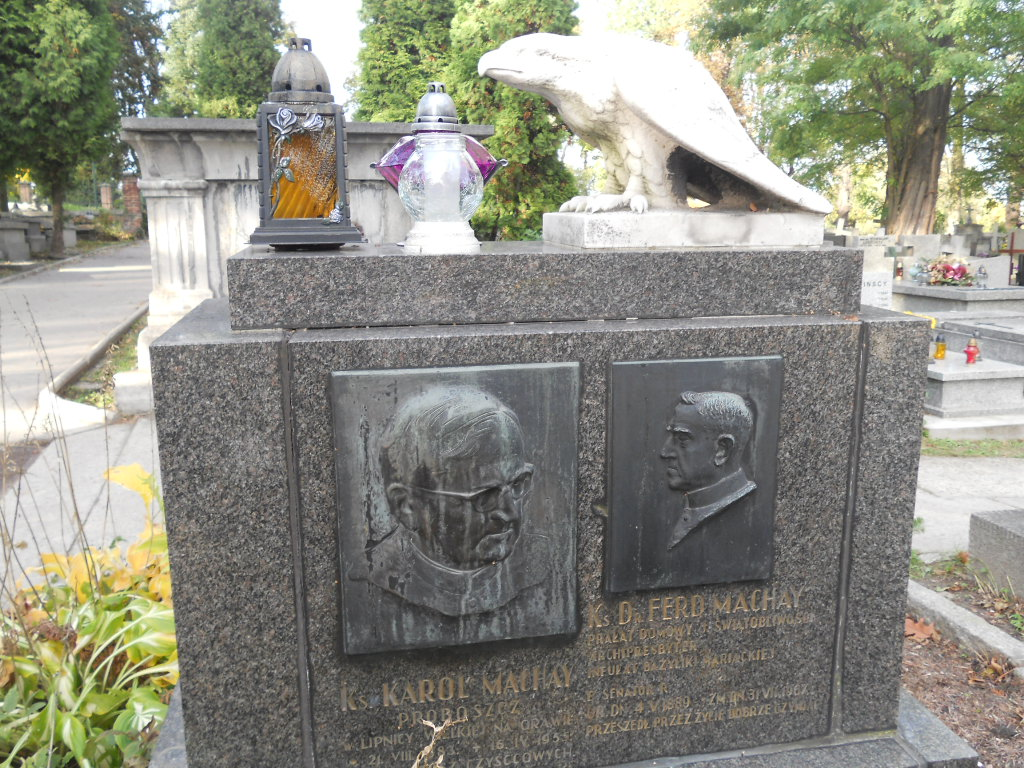 Grobowiec Ferdynanda Machaya (starszego) na Cmentarzu Salwatorskim w Krakowie.